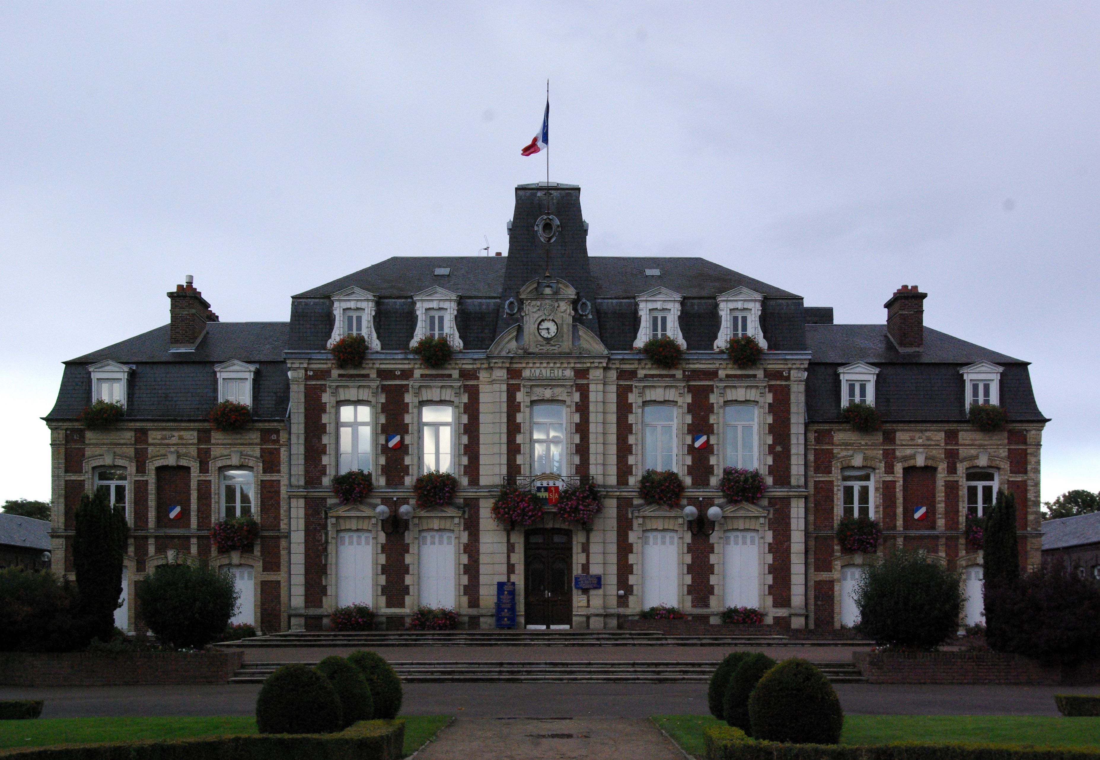 Saint Aubin les Elbeuf in Frankreich. Das Rathaus in der Stadt an der Rue Pattensen. Pattensen ist die Partnerstadt und liegt südlich Hannovers.